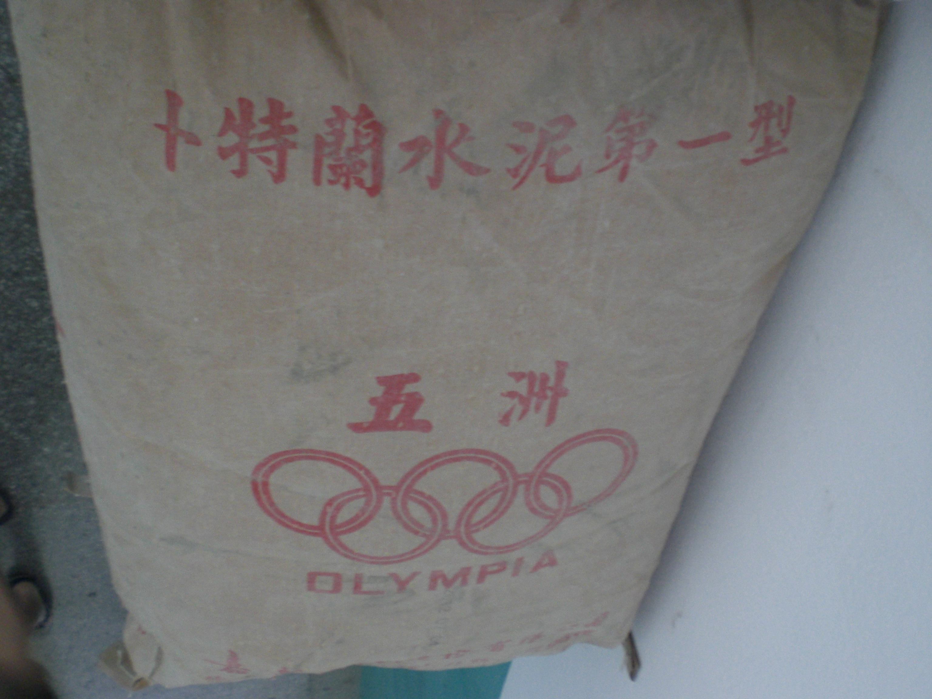 嘉新水泥製造的五洲牌卜特蘭水泥第一型的包裝袋頂端。